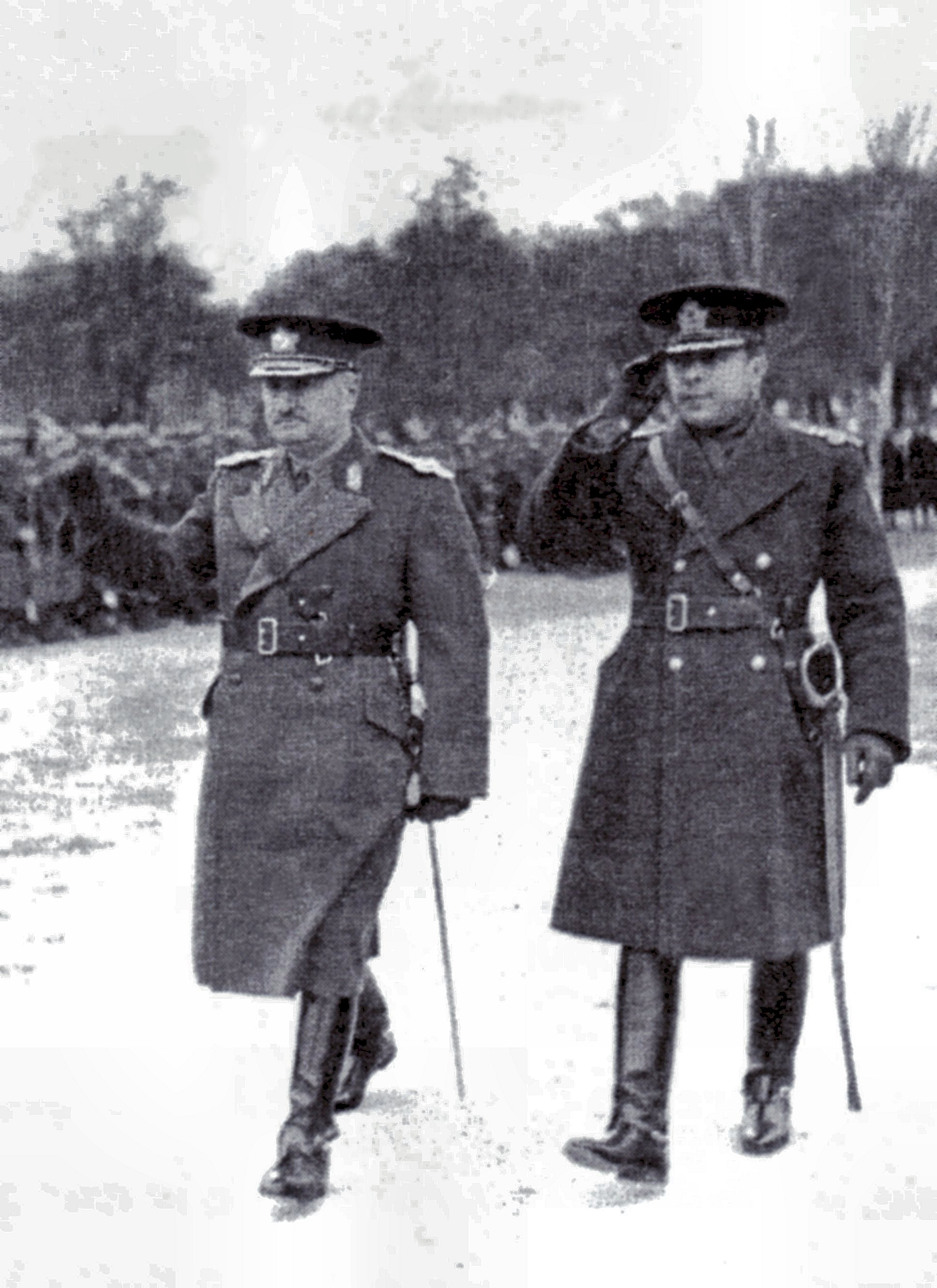 Aurel Racovitză als General, links, bei einer Truppenabnahme 1939/40